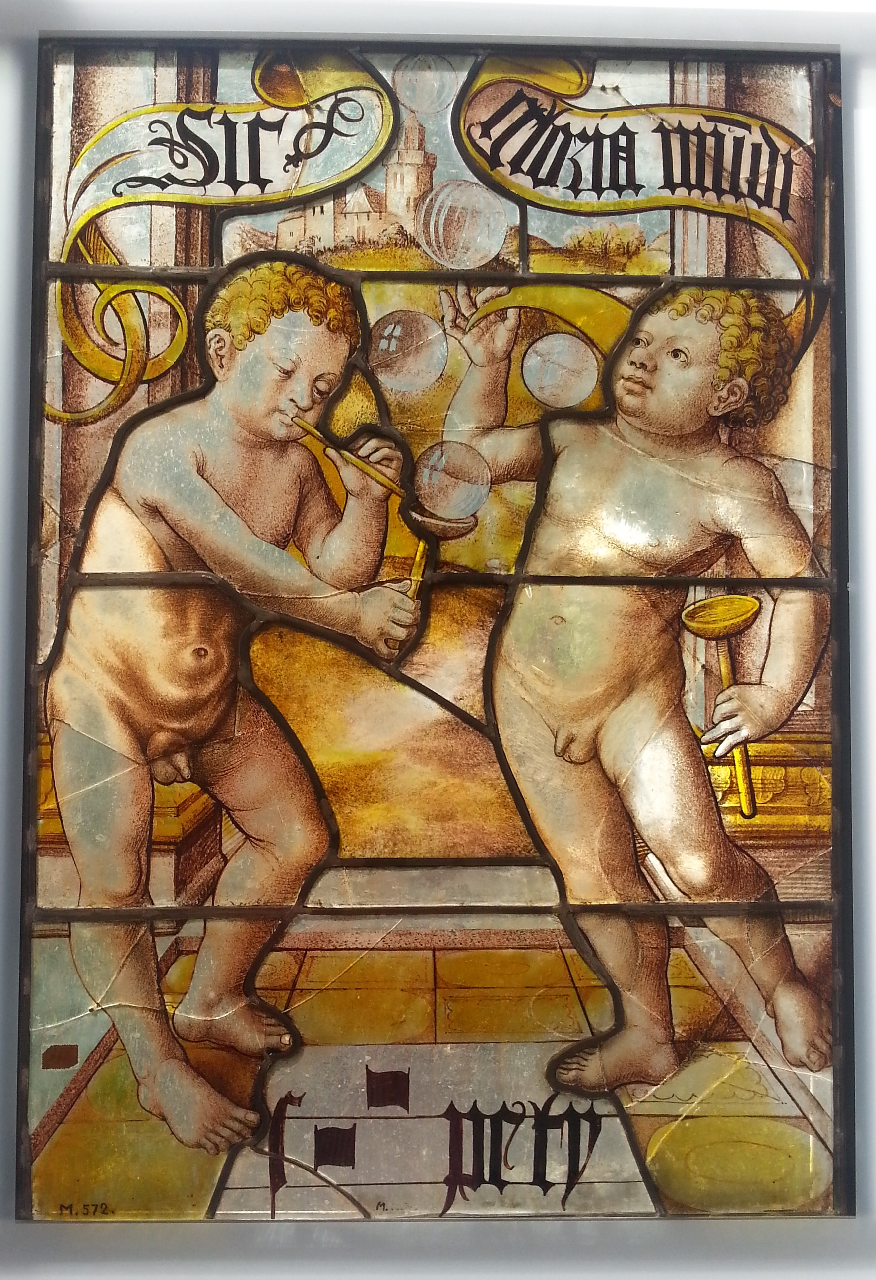 Glassmaleri av gutter som blåser såpebobler. Augustiner-Eremitenkloster? Köln ca 1530.